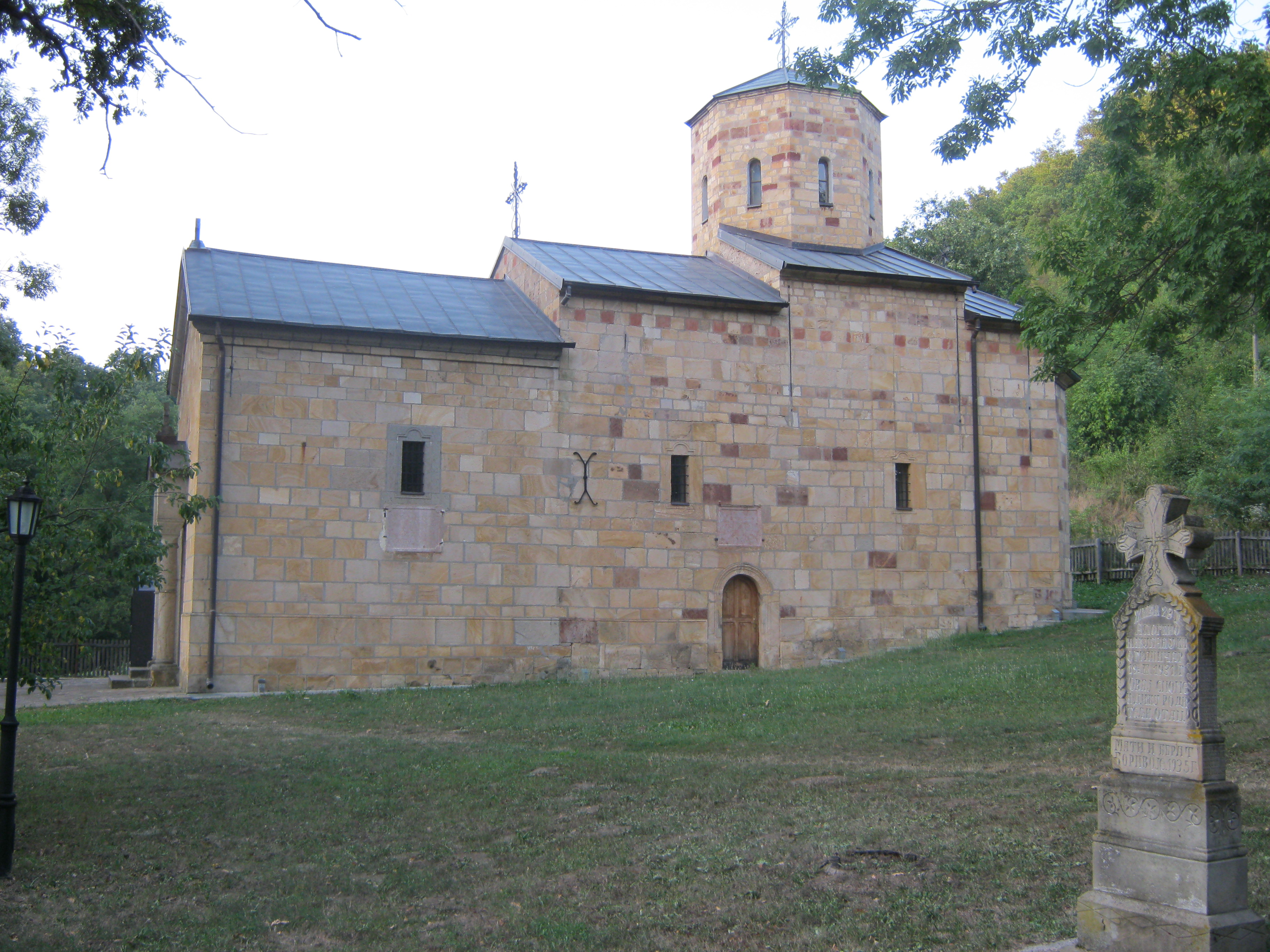 Српски (ћирилица): Црква светог Саве на Савинцу је подигнута 1819. године, а њен ктитор је био кнез Милош Обреновић. Цркву је кнез Милош саградио у знак захвалности за победу на Љубићу.